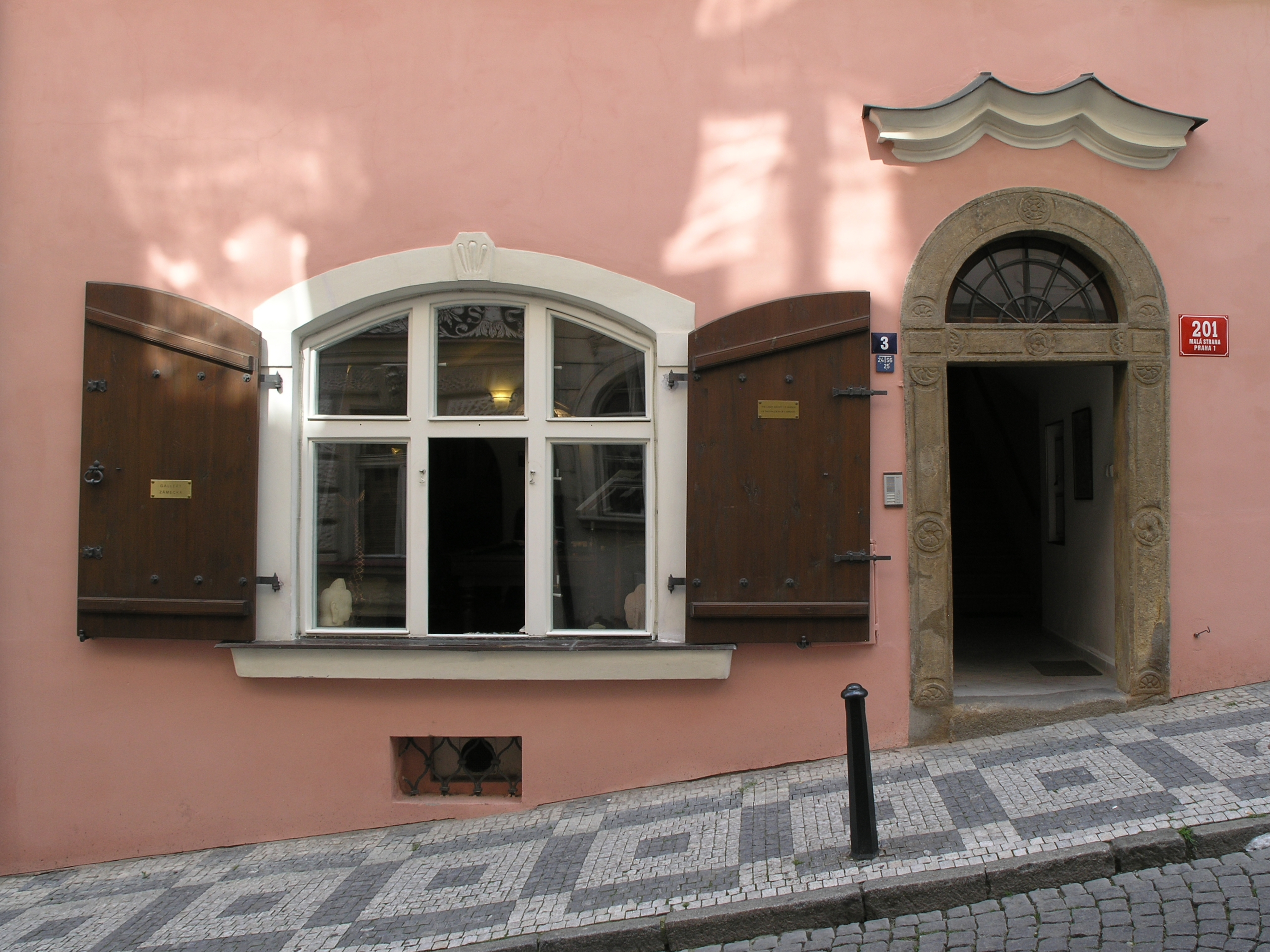 Praha, Malá Strana - ulice Zámecká